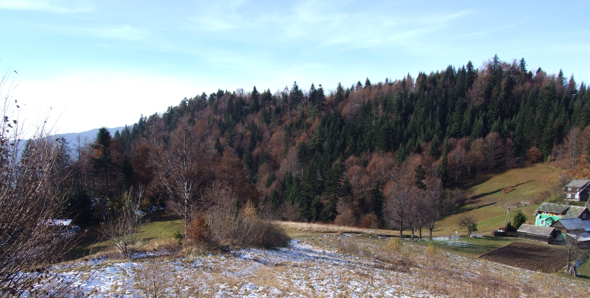 Przełęcz Złotne i część osiedla Złotne, Po lewej stronie przełęczy zalesiony grzbiet Pusta z rezerwatem przyrody